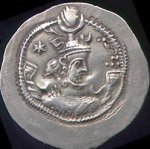 Pièce du règne de Kavadh Ier